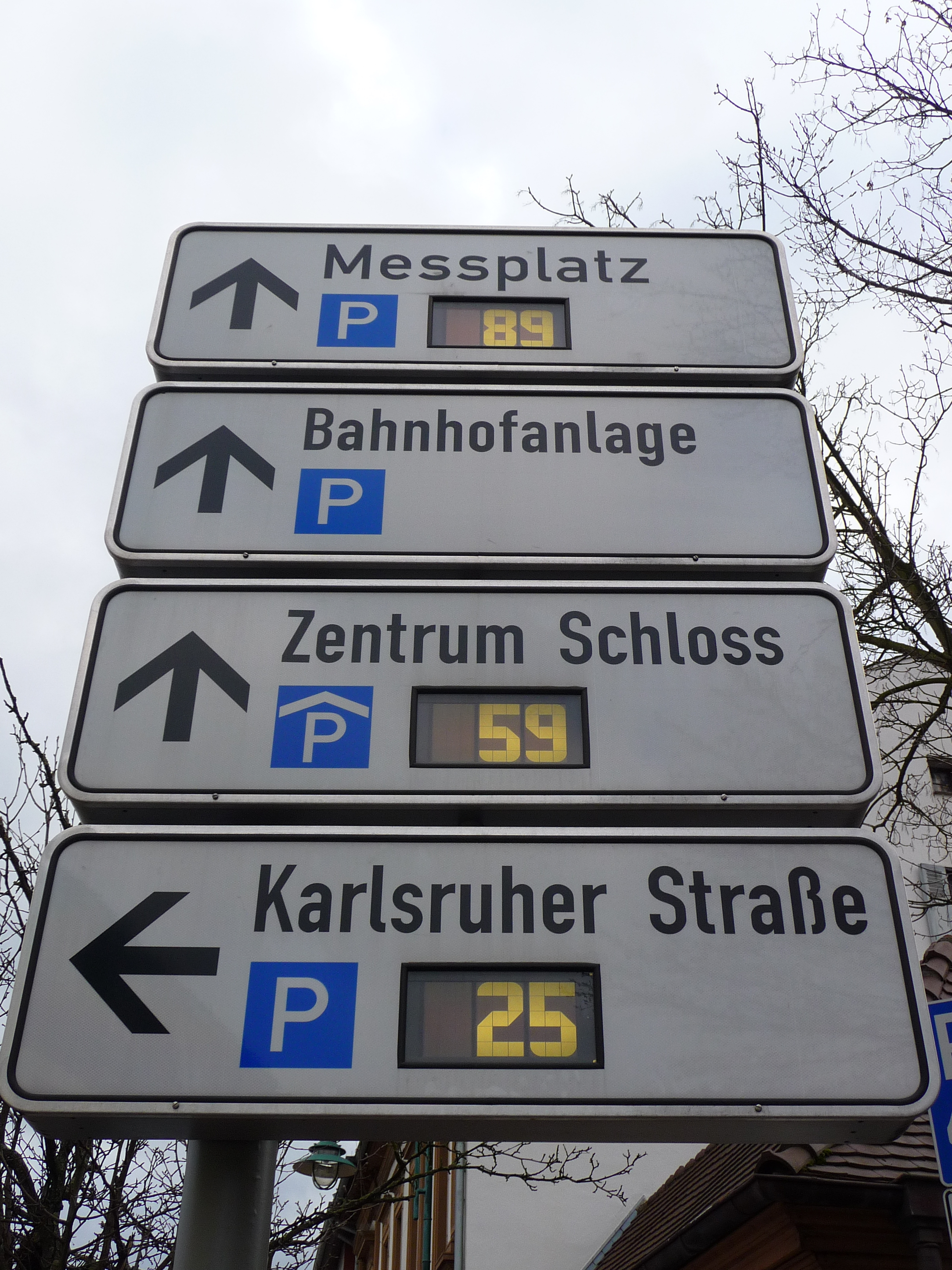 Parkplatzleitsystem in Schwetzingen (Rhein-Neckar-Kreis)